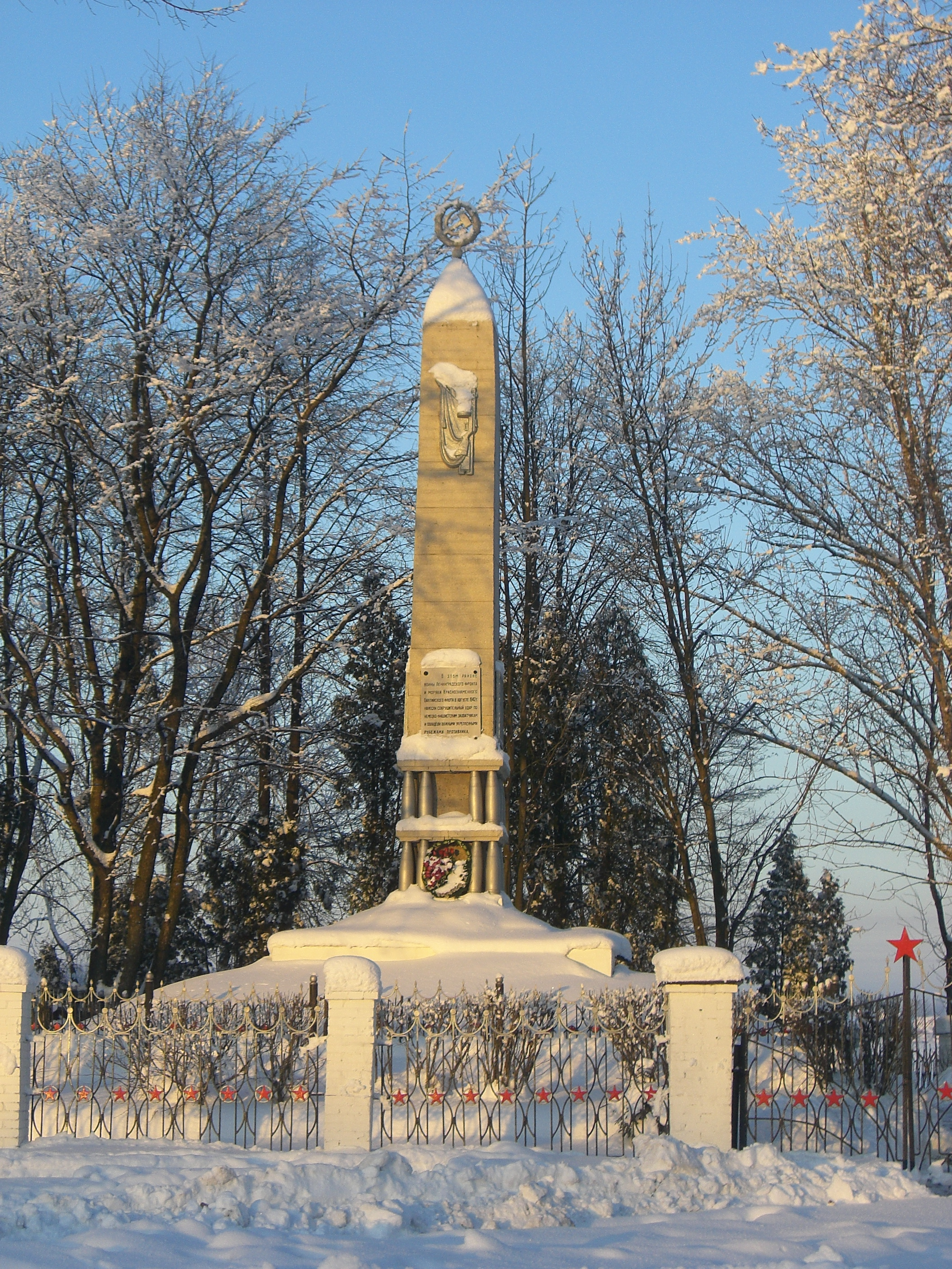 Ивановский пятачок. Обелиск в городе Отрадное Ленинградской области